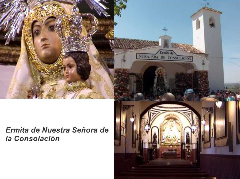 Imagen del exterior, interior y de Nuestra Señora de la Consolación, en Castellar (Jaen)